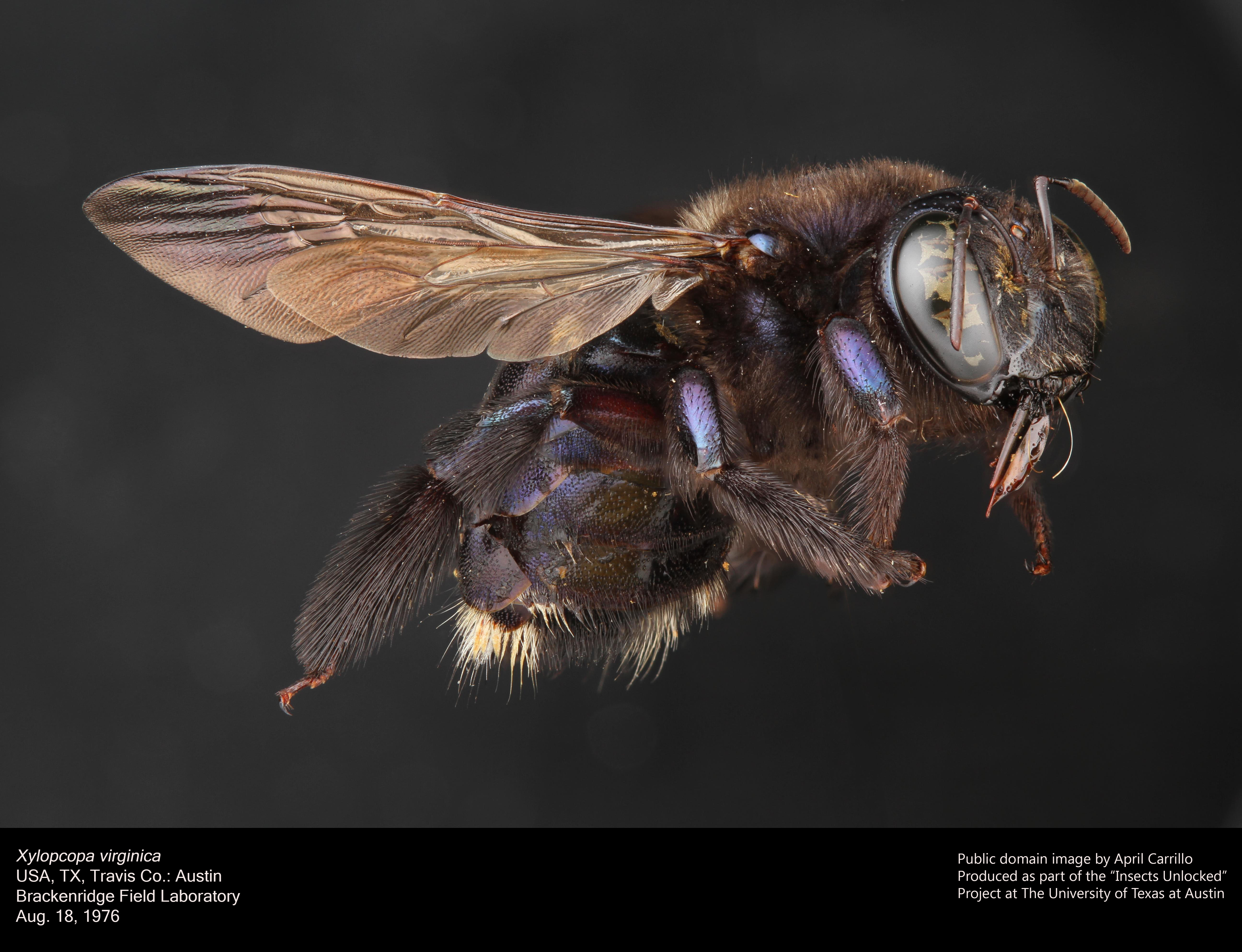 Xylocopa virginica